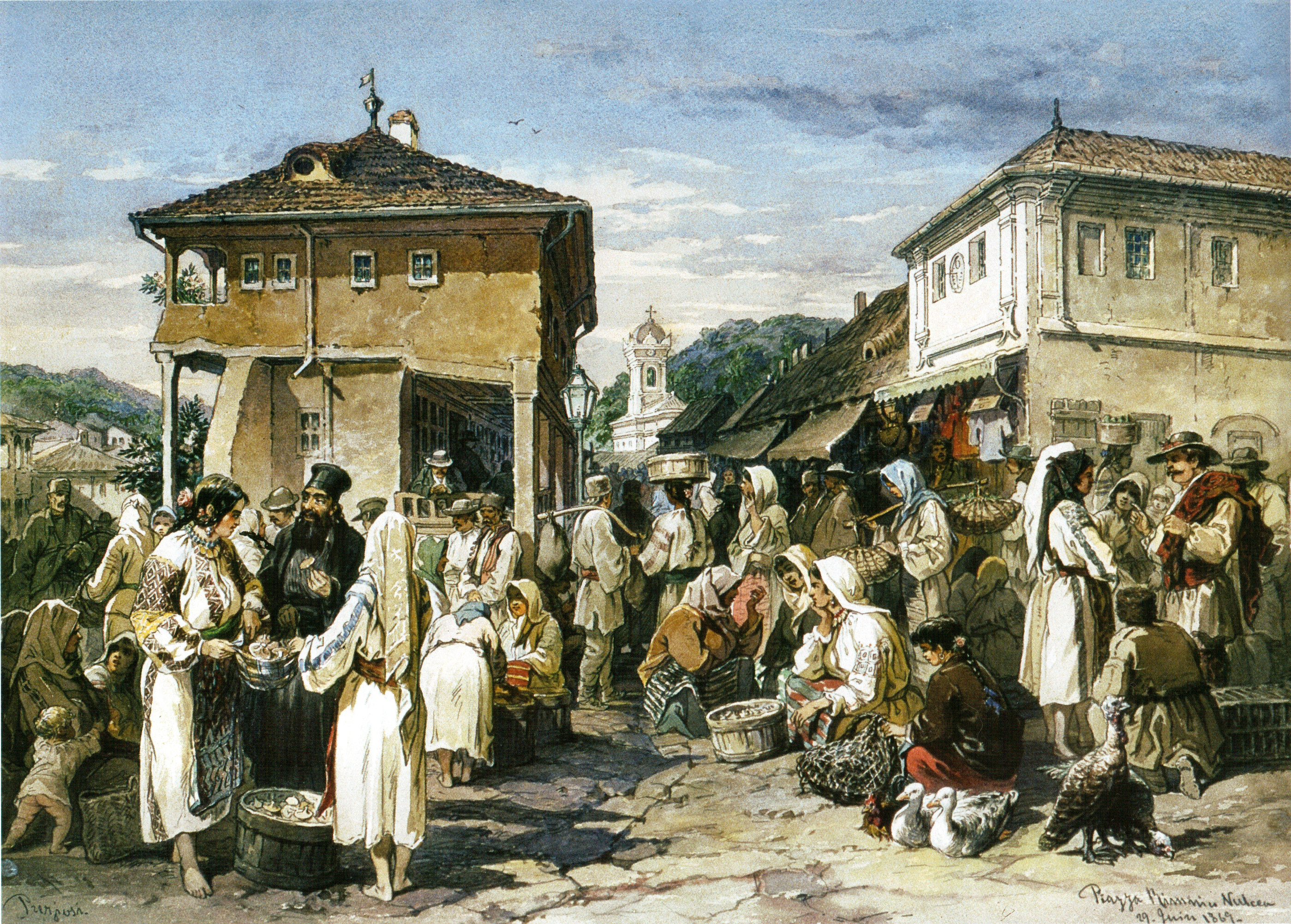 Piaţă la Râmnicu Vâlcea